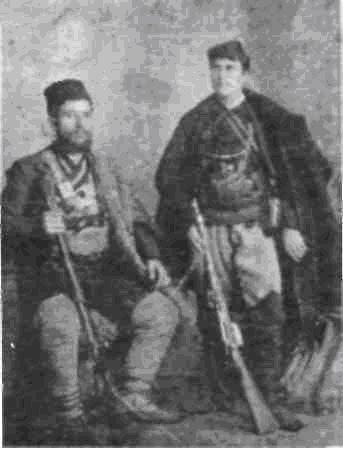 Васе Пехливана и Христо Иванов.